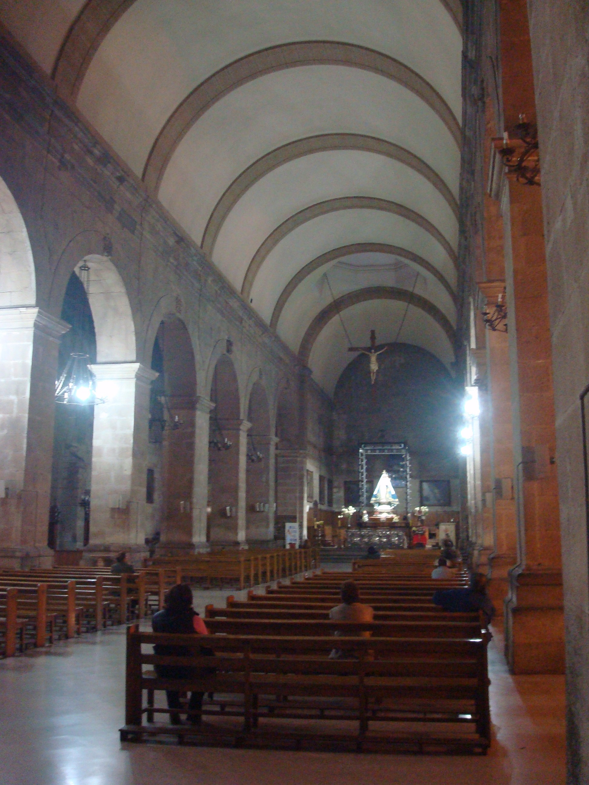 Interior de la Iglesia de Santo Domingo, Santiago de Chile